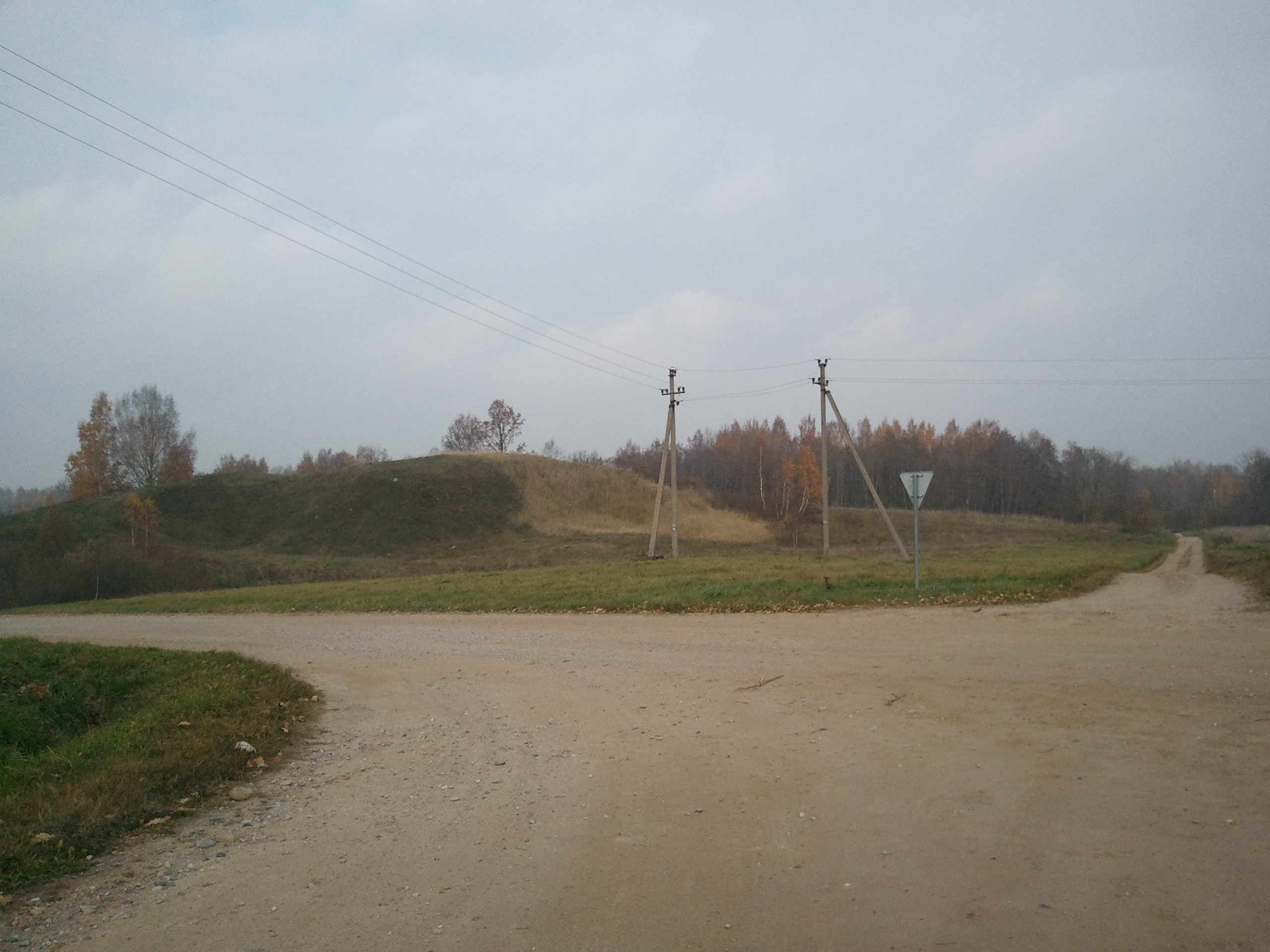 Spitrėnų piliakalnis nuo Spitrėnų sankryžos pusės